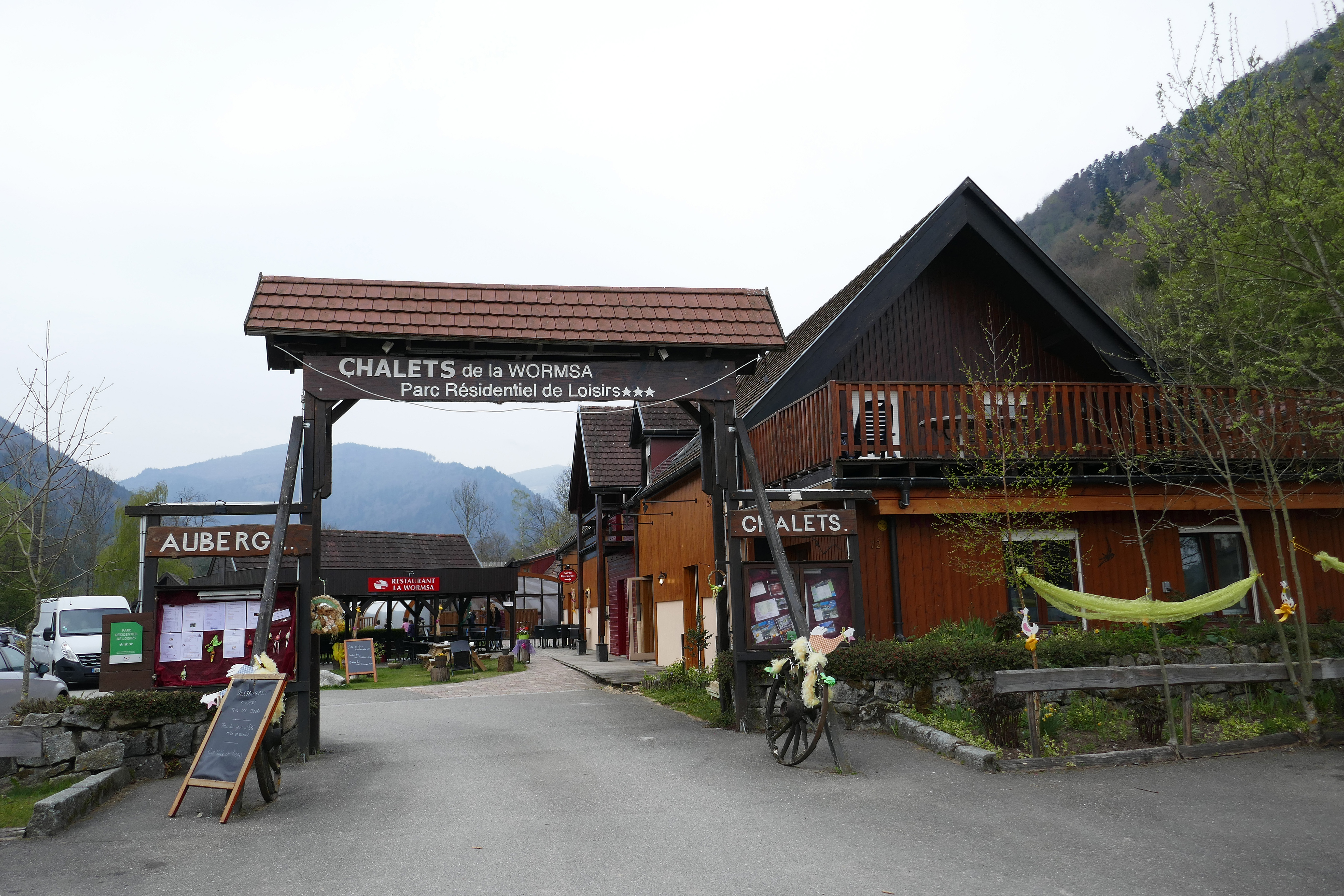 Chalets de la Wormsa (Metzeral, Haut-Rhin).